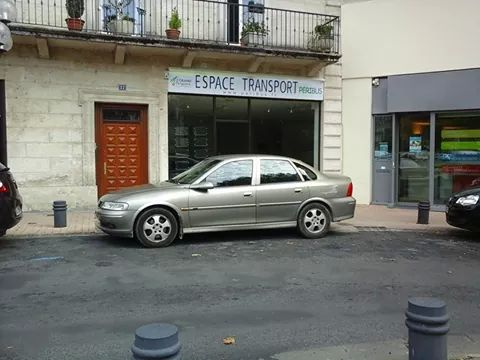 Péribus